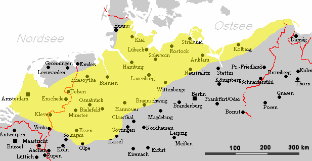 Verbreitungsgebiet des Fachhallenhauses unter Nutzung der Kartenskizze Bild:Niederdeutsche Mundarten.PNG von Benutzer:Postmann_Michael und Zeichnung zum Verbreitungsgebiet nach Johannsen 1974 in: Seedorf, Meyer, Landeskunde